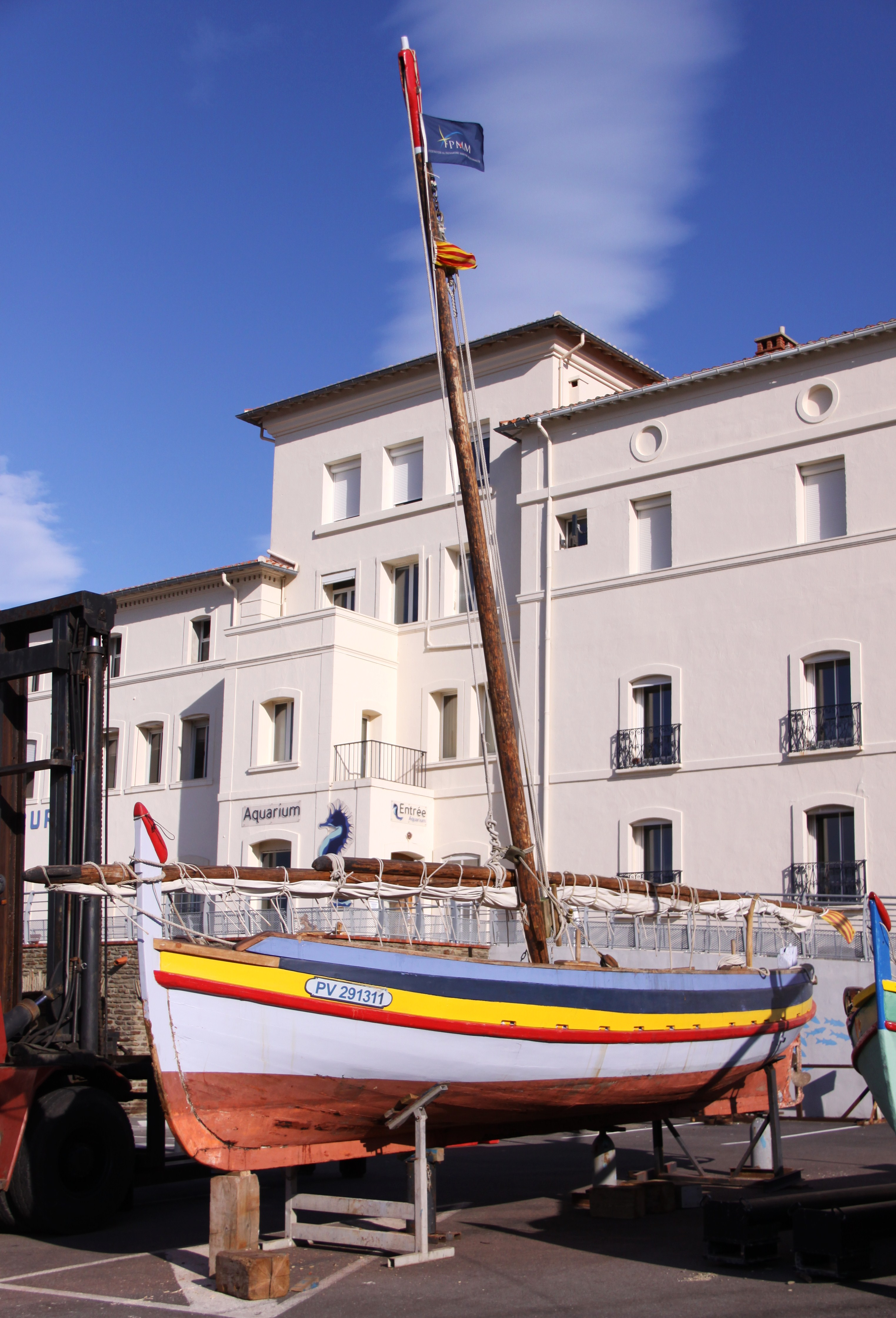 La barque catalane "Albada" sur cale, en hivernage au port de Banyuls-sur-Mer. Elle a été construite en 1954 à Valras par les chantiers de charpenterie marine Doumairon. Elle mesure 9,12 mètres de long, 2,65 mètres de large et a un creux de 0,92 mètre. L' "Albada" qui signifie "aube" ou "aubade" en catalan, appartient à l' association de conservation et de transmission du patrimoine maritime catalan Vela i Vent située à Banyuls de La Marenda. Banyuls-sur-Mer, Pyrénées-Orientales, France.